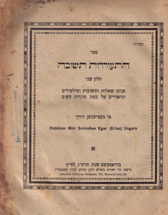 Book Hitorerut Tshuva